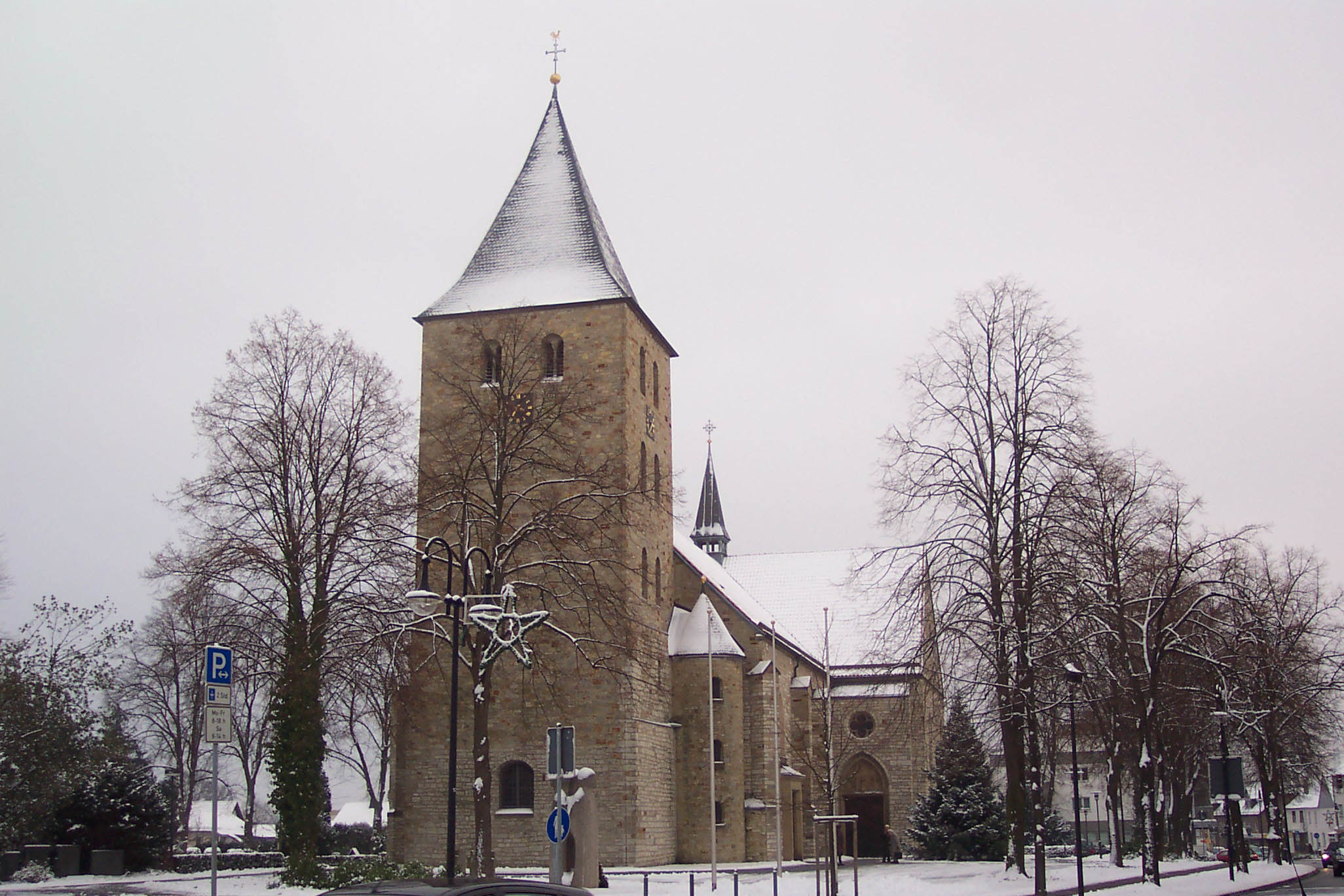 Photo taken by Steffen Hillebrand, Paderborn-Elsen, D